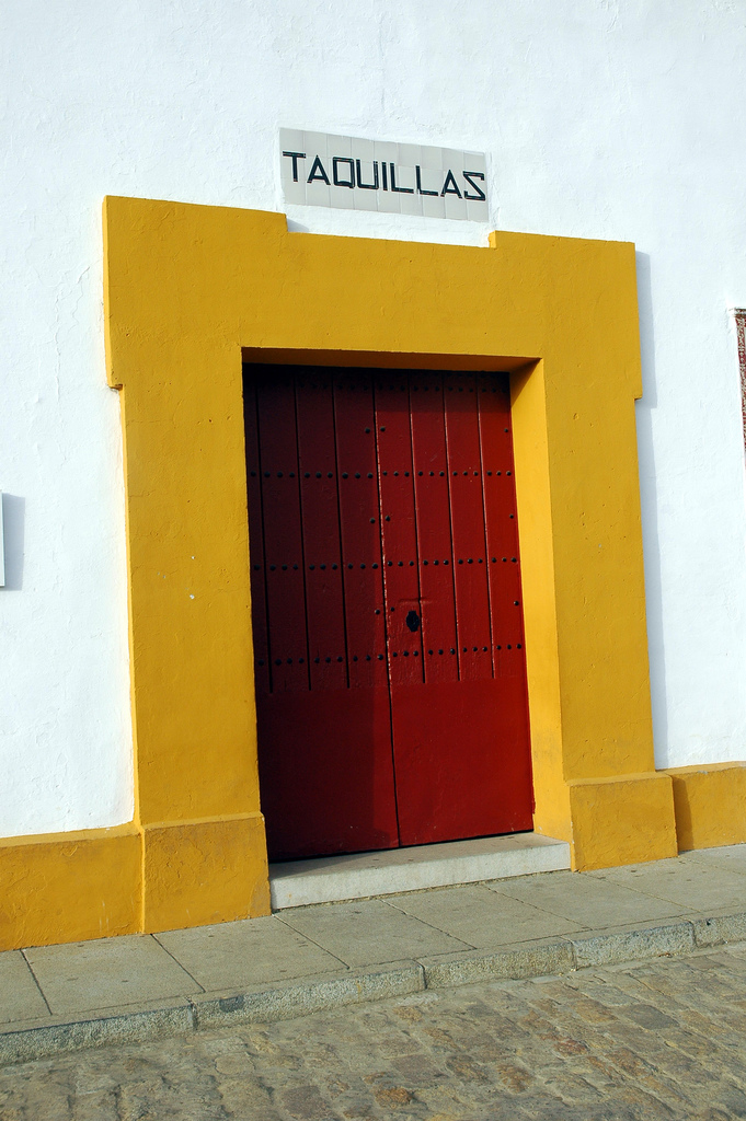 Maestranza de Sevilla